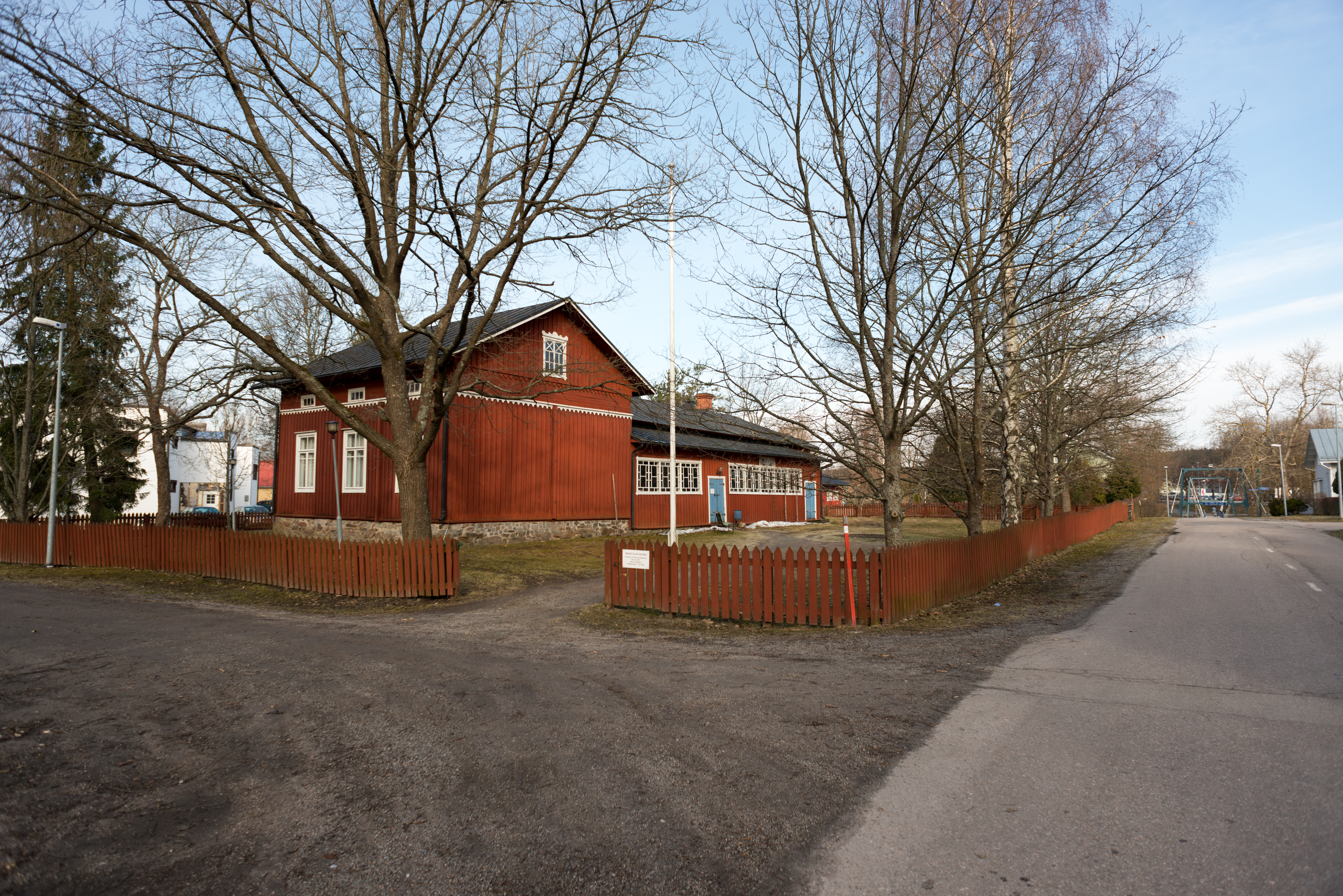 Meritalon museo Salossa